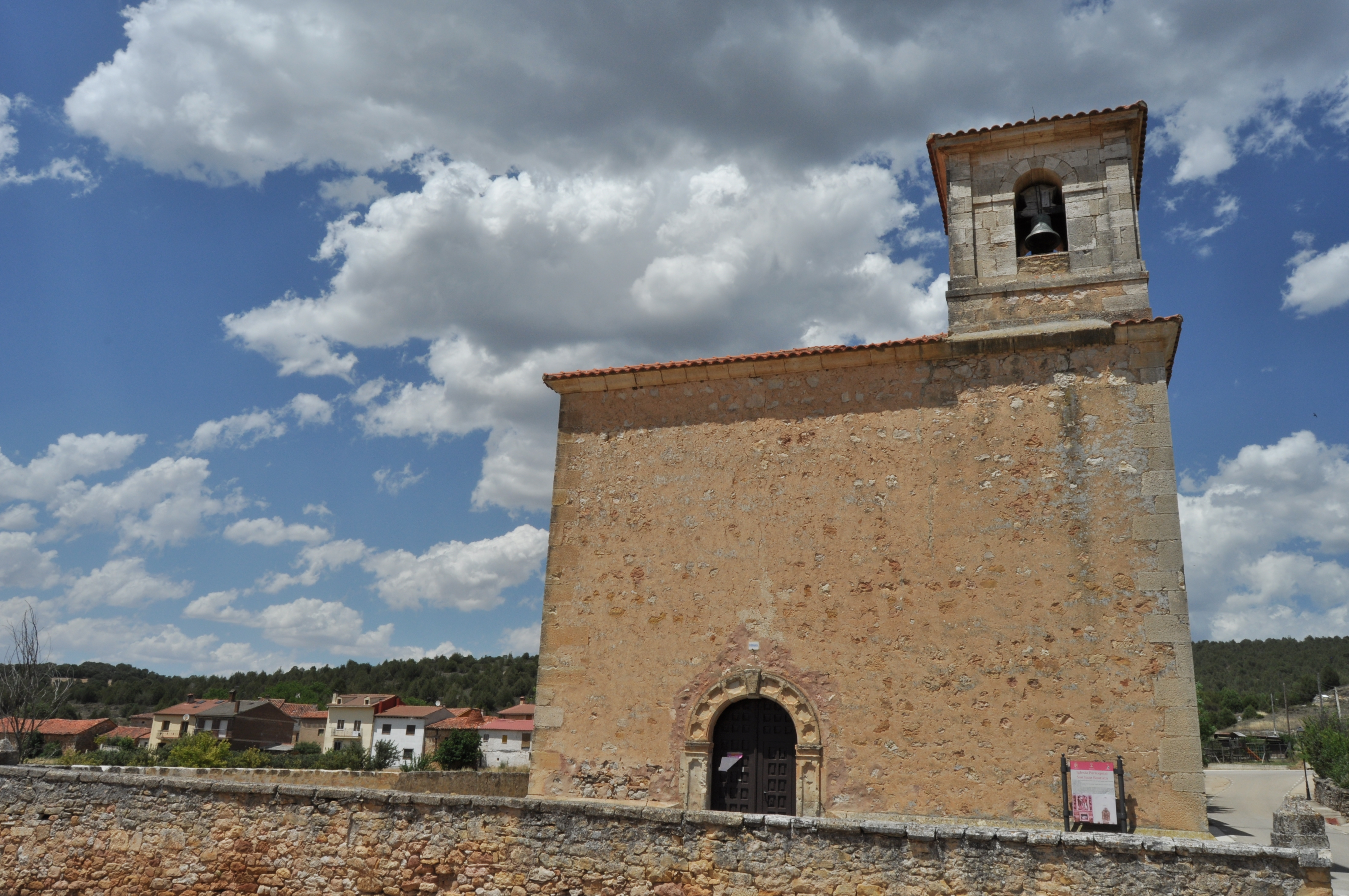 Santibañez del Val - 008